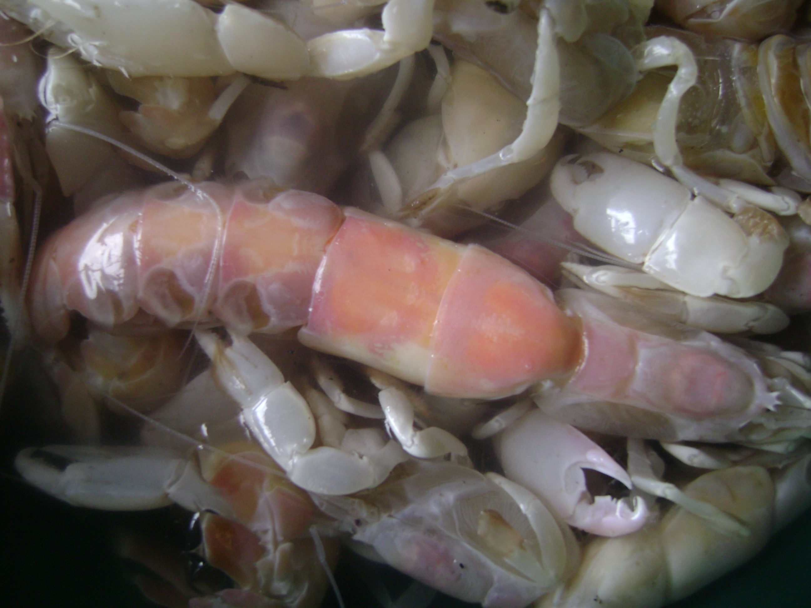 LE "mbea towé" est une escpece de crevette qui n'apparait qu'une fois l'an pendant une periode de 3 à 5 jours et qui annonce la fin de la saison de pluie et le debut de la saison seche.elles sont à l'origine du nom cameroun car lorsque les portugais arrivent au cameroun,ils entre par le wouri et trouve le fleuve innondé de crevettes qui flottent sur l'eau.ils appellent alors celui-ci "rio dos camaroes" en francais "riviere des crevettes"le mot "camaroes" a subit plusieurs modifications pour enfin devenir "camreroun" cette crevette est sacré chez les "SAWA" pleuple riverain du cameroun